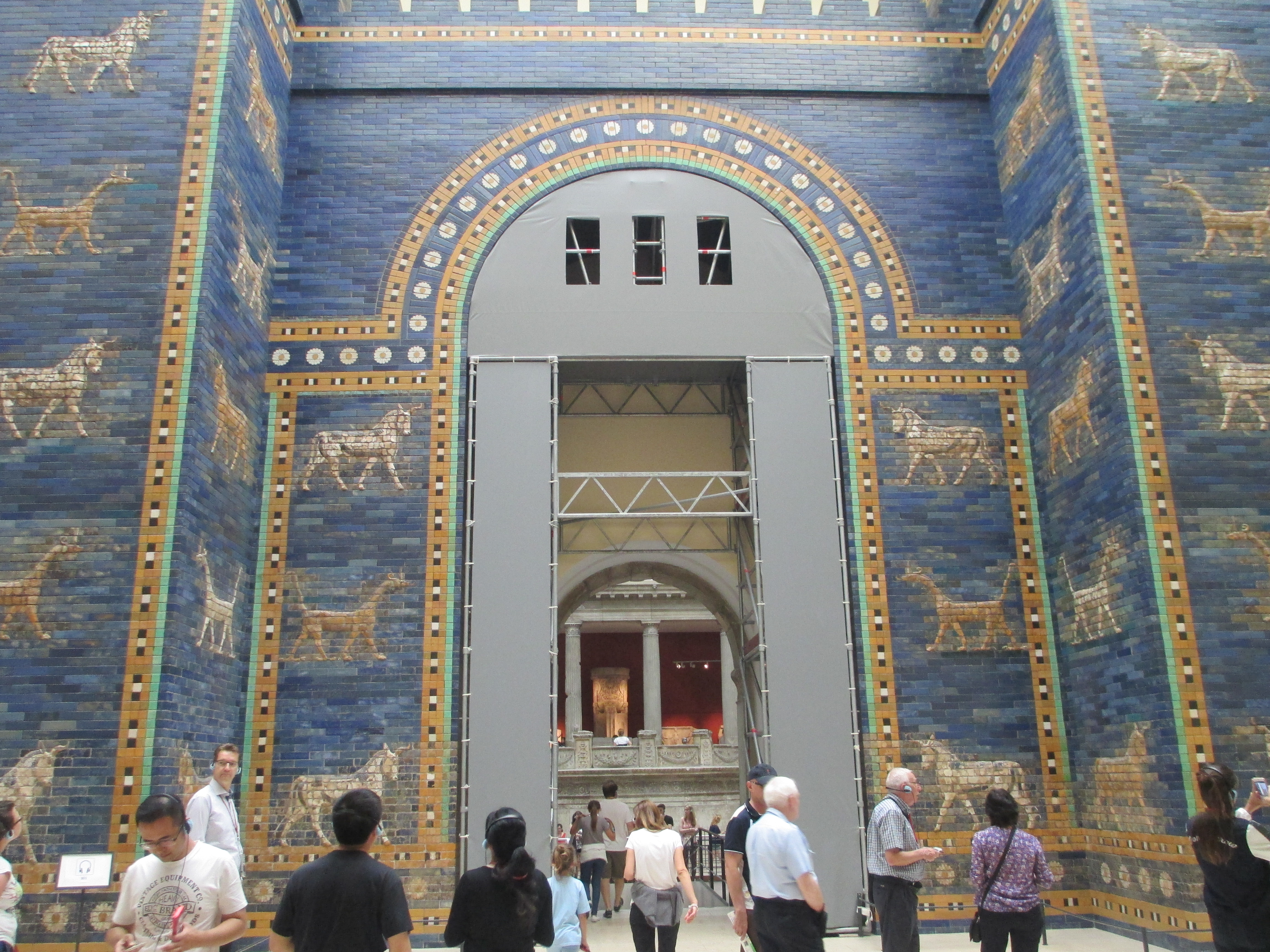 שער עשתר במוזיאון פרגמון